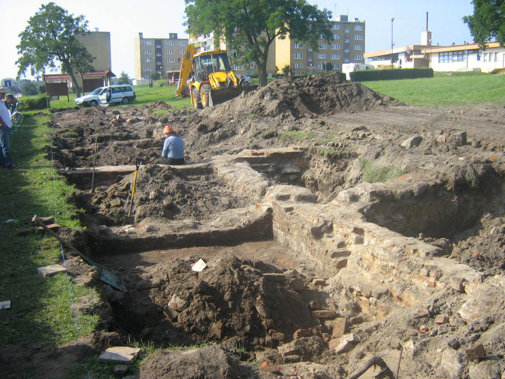 Rewitalizacja centrum miasta